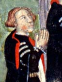 Jean Garaud, né vers 1380, coseigneur de Colomiers et de Pibrac; capitoul de Toulouse en 1412 (date de la réalisation du portrait)